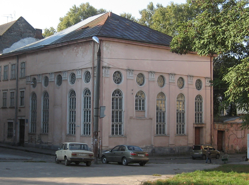 Синагога на Угольной Львов